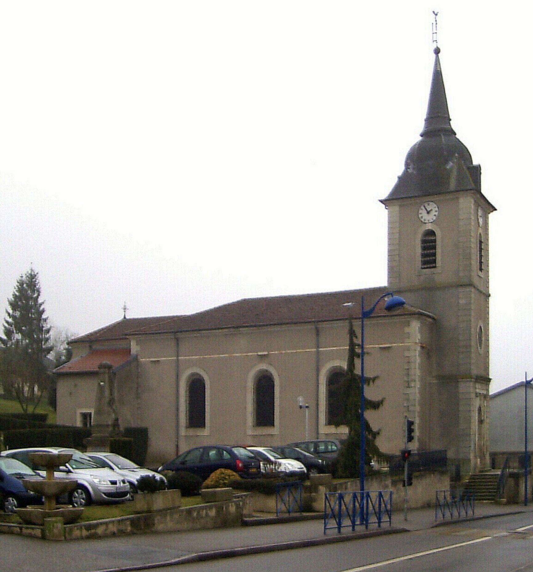 L'église Saint-Blaise à Chavigny